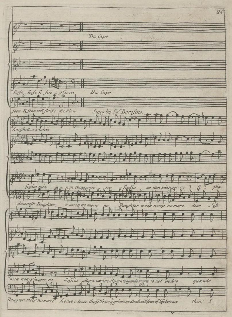 Sterbelied des Bajazet (Händel: Tamerlano), J.Cluer (1724)